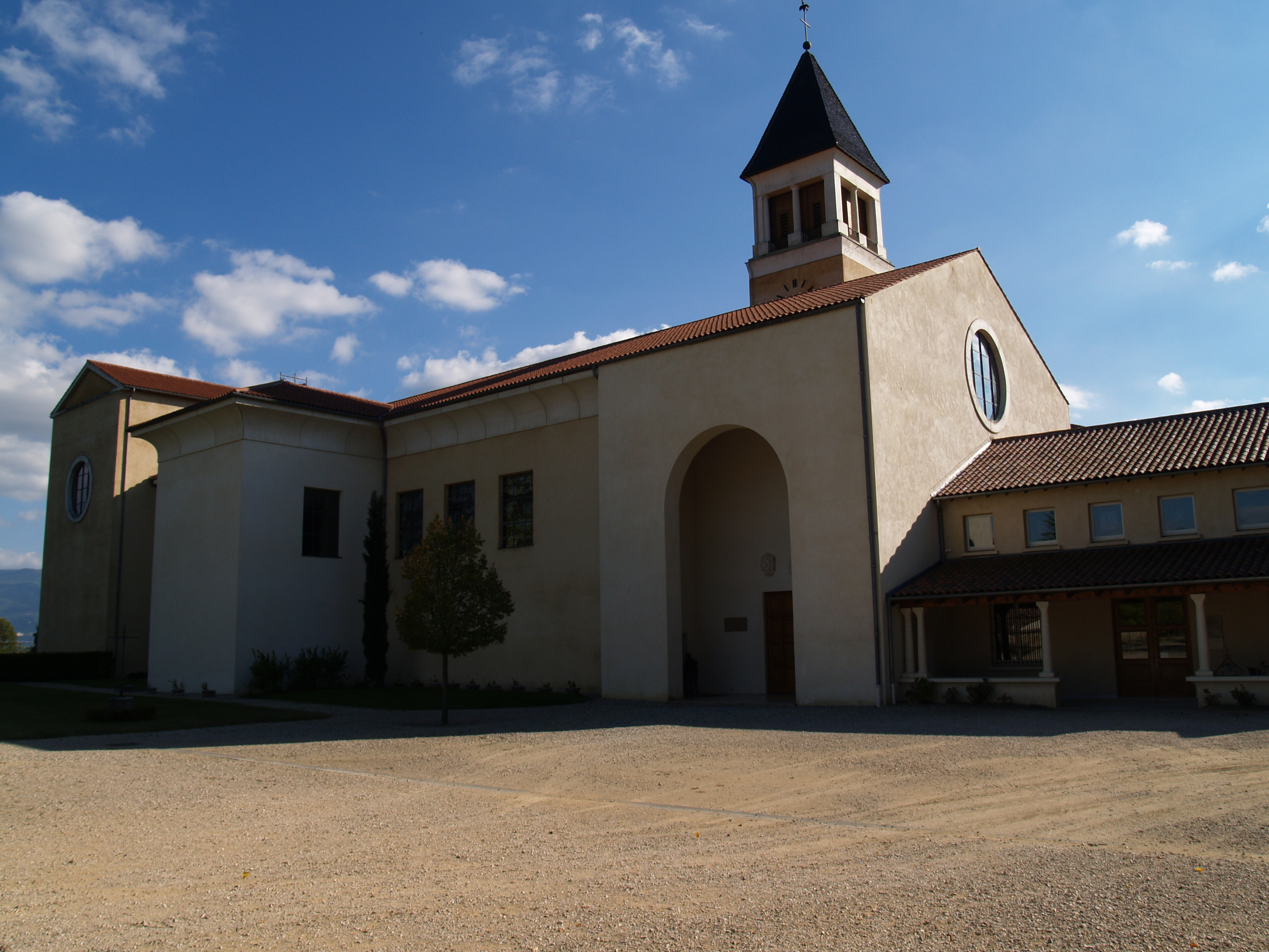 abbaye bénédictine de Triors en France. Construction fin XXe siècle, style roman-provençal, à partir d'un château XVIIIe.